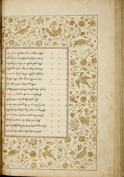 ვეფხისტყაოსნის ბეგთაბეგისეული ნუსხა